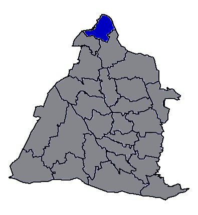 臺灣省彰化縣伸港鄉。